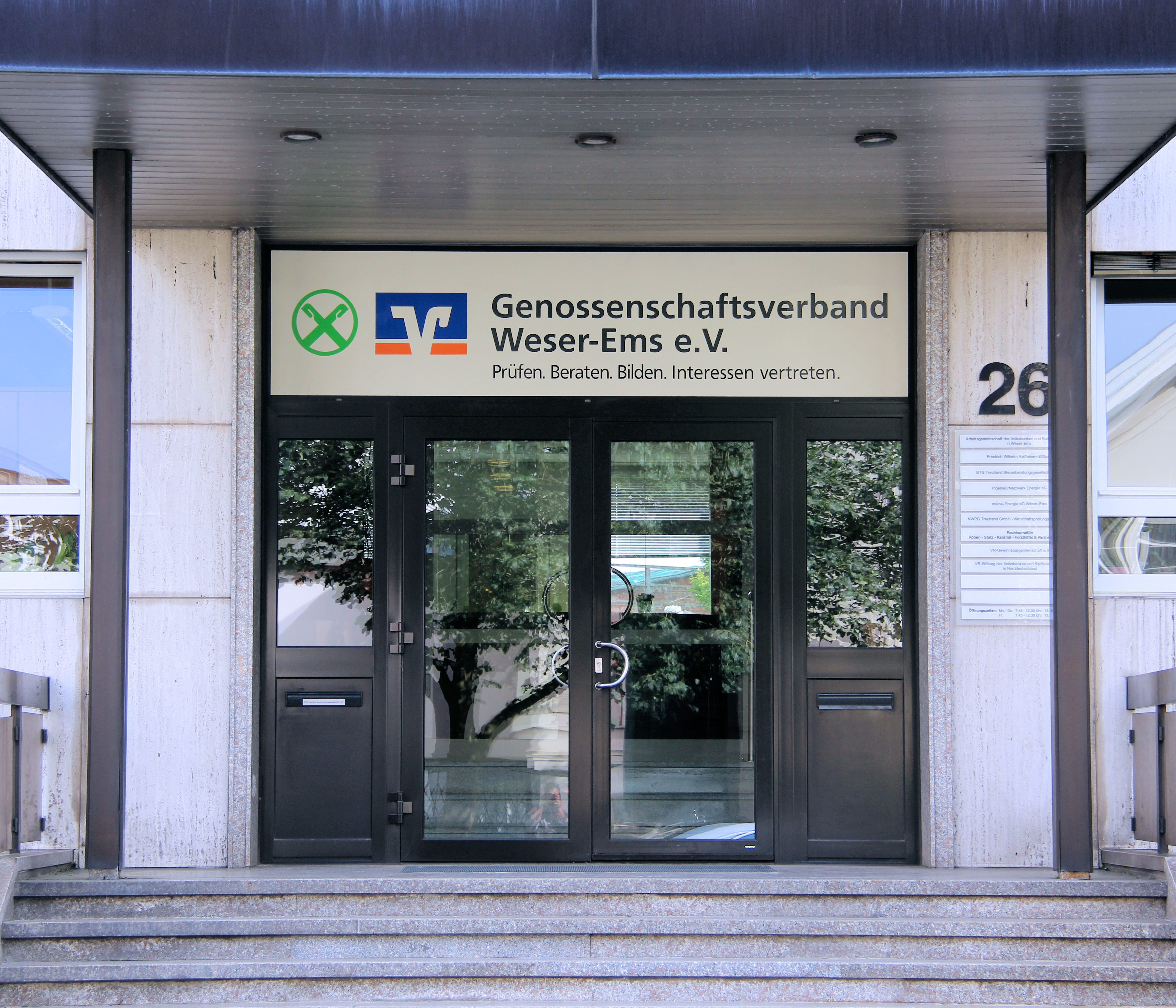 Haupteingang des Genossenschaftsverbandes Weser-Ems, Raiffeisenstraße 26, 26122 Oldenburg